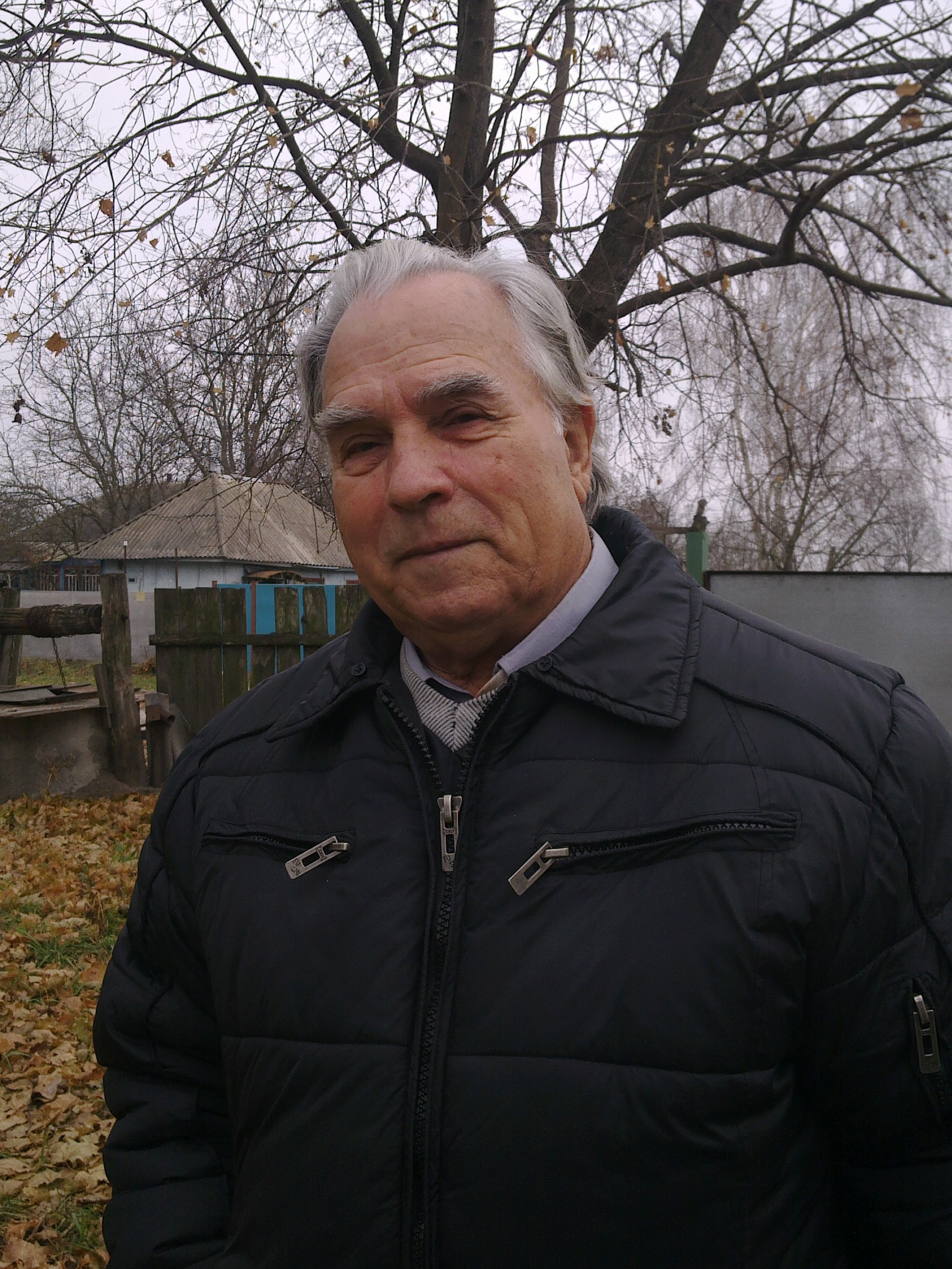 Український письменник і краєзнавець Дмитро Андрієвич Головко